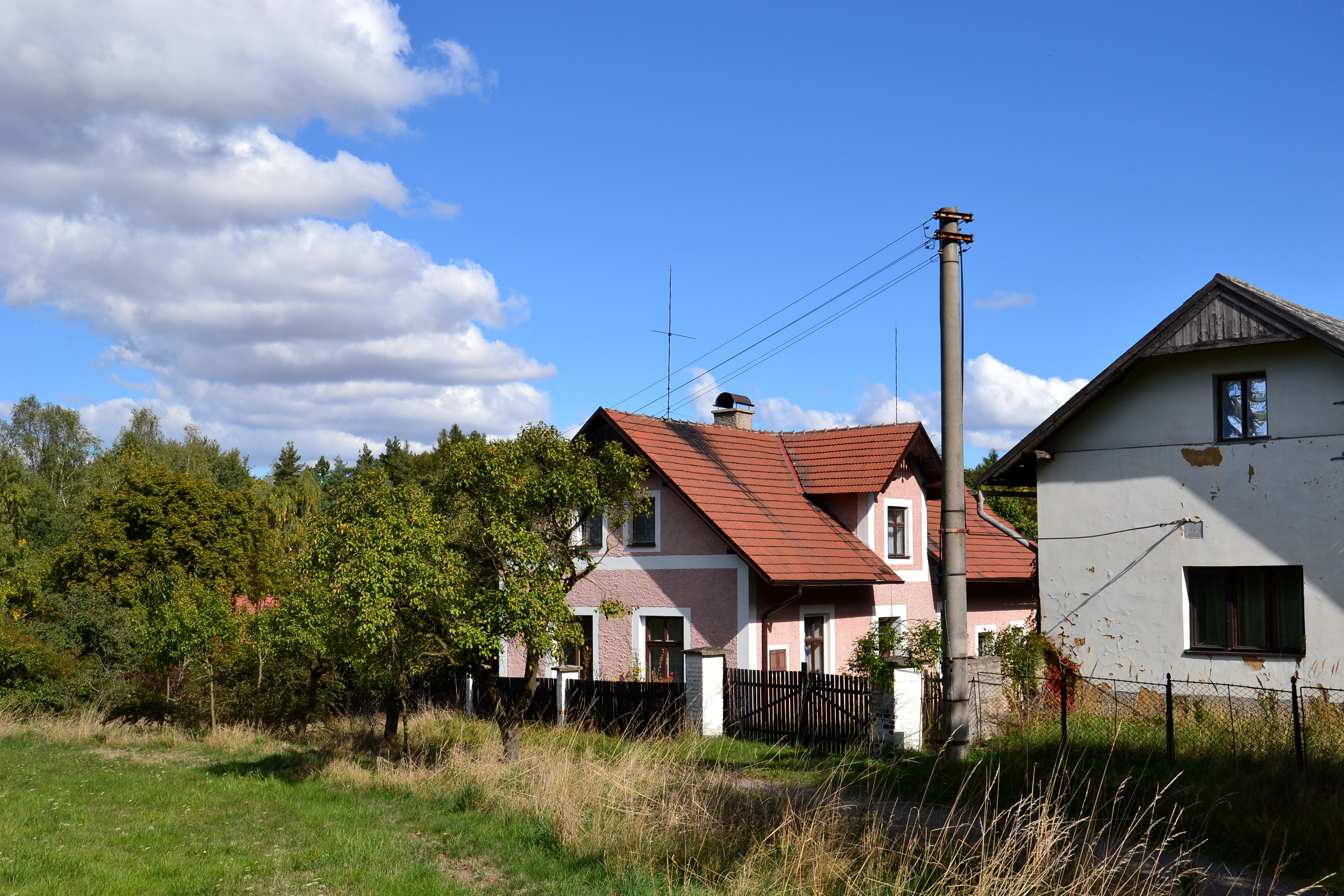 Domy u vjezdu do osady